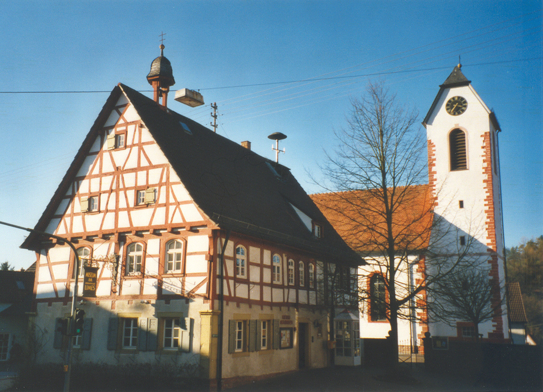 Neckarburken Ortsmitte. Rathaus und Kirche bilden ein schönes Ensemble. Im ehemaligen Rathaus ist heute das Museum Elantia untergebracht.